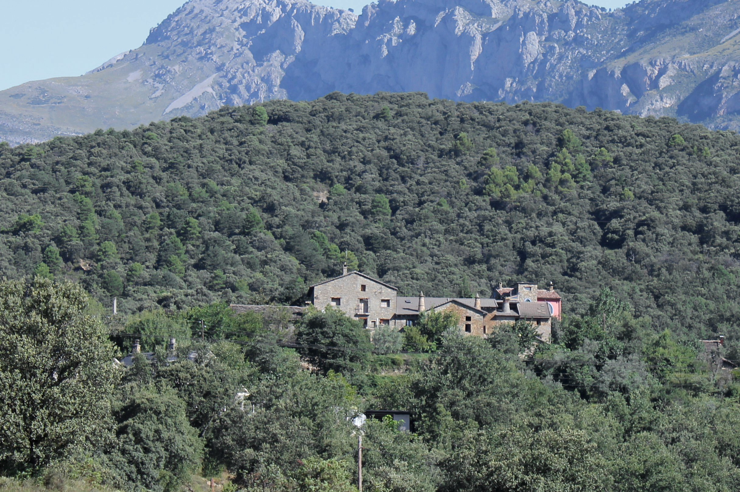 Aragonés: Vico alto de Fosau (A Fueva), que ha nombre de Villa.